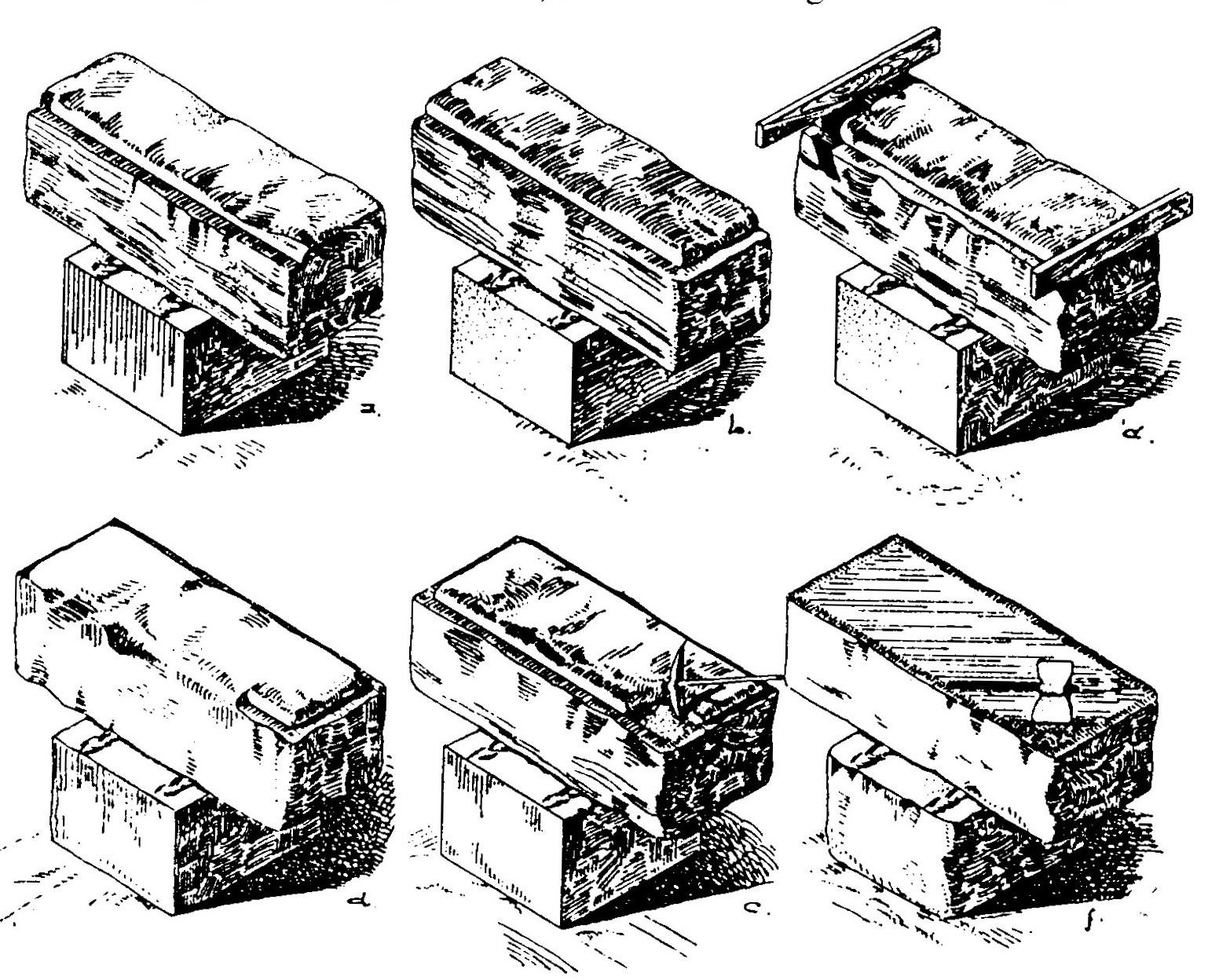 Randschläge ziehen: a. Steinquader aufbanken und ersten Längsschlag ziehen, b. Querschlag ziehen, c. Zweiten Querschlag mit Richtscheiten einvisieren, d. Zweiten Längsschlag ziehen, e-f. Entfernung des Bossen mit Zweispitz bzw. Fläche.